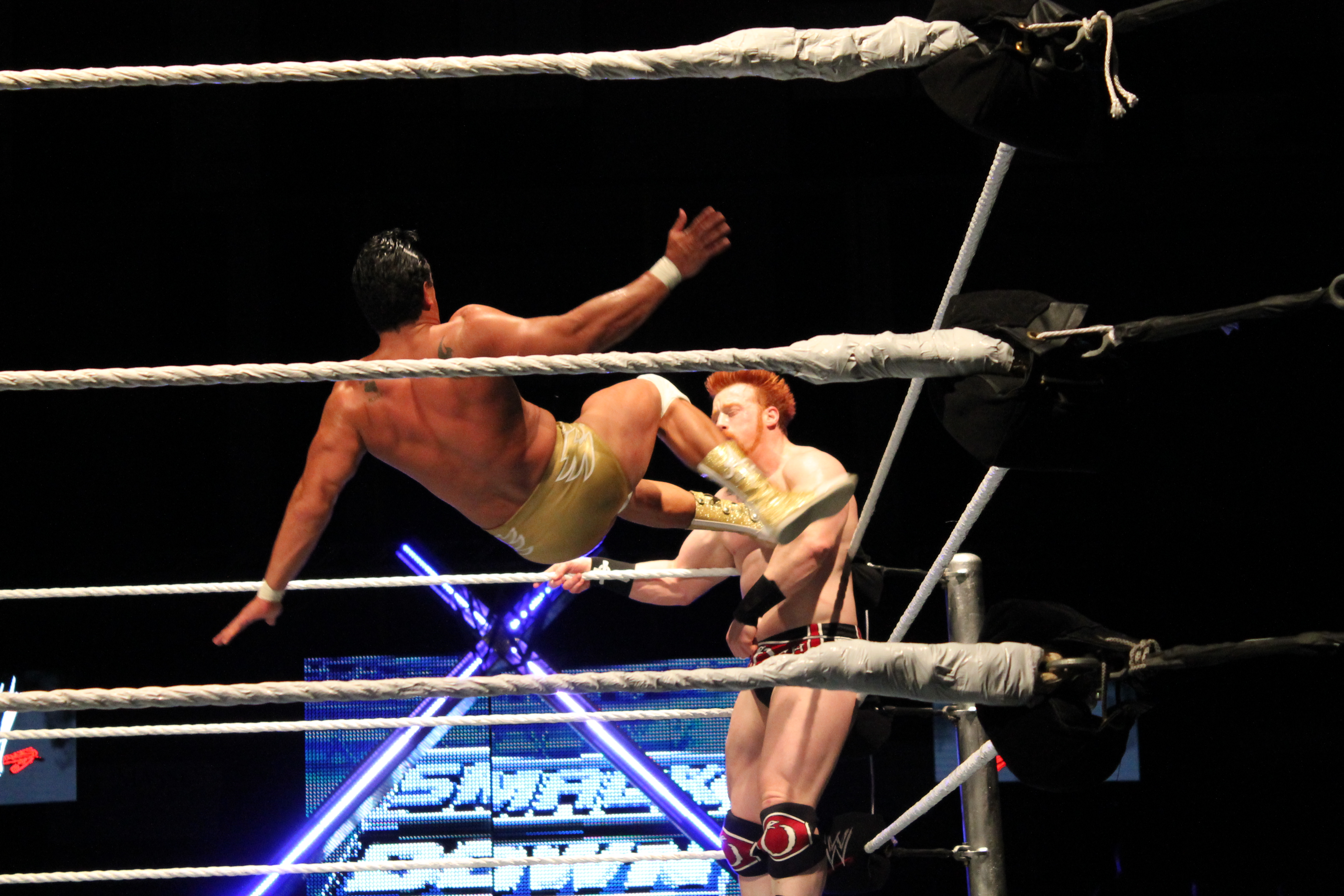 del rio kick